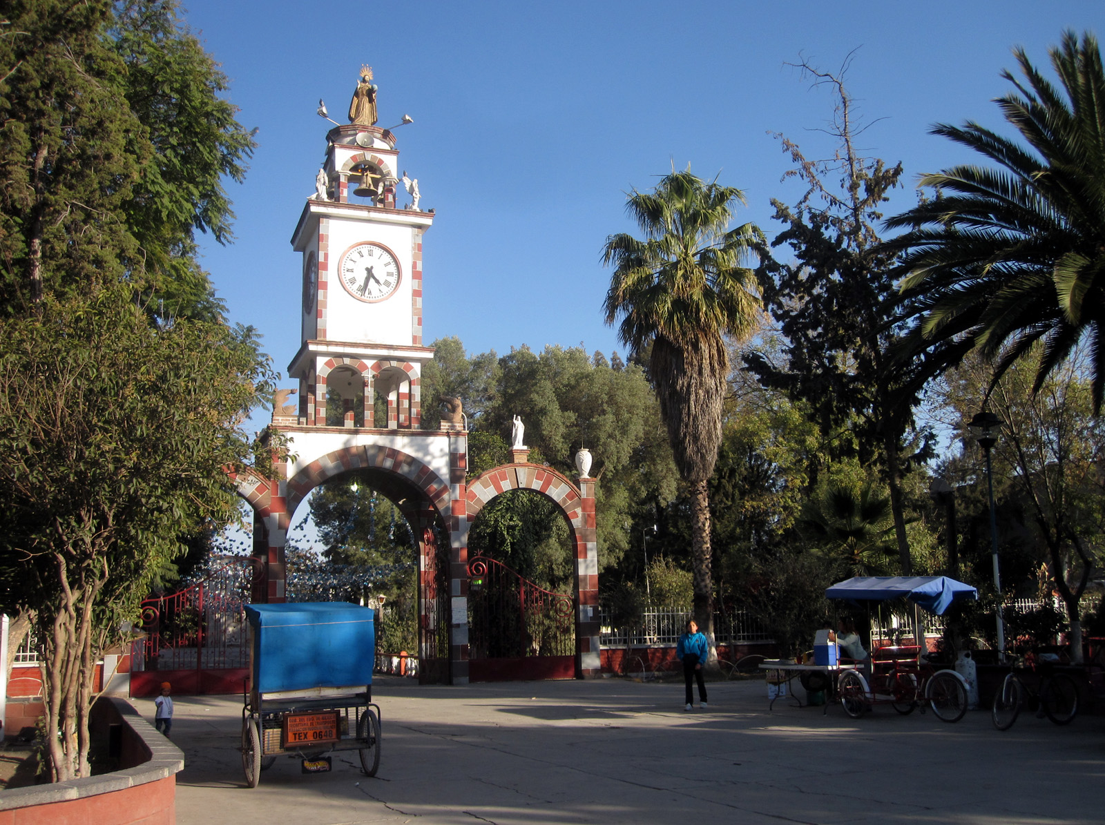 Reloj del Divino Salvador i sentrum av San Salvador Atenco i Atenco kommune i Mexico.